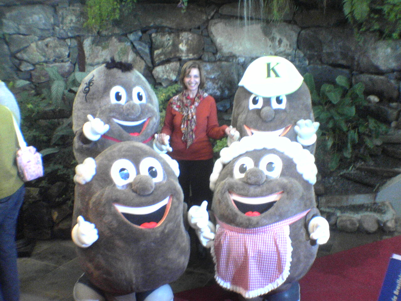 Deputada federal Yeda Crusius e os mascotes da Fenakiwi (Feira do Kiwi)